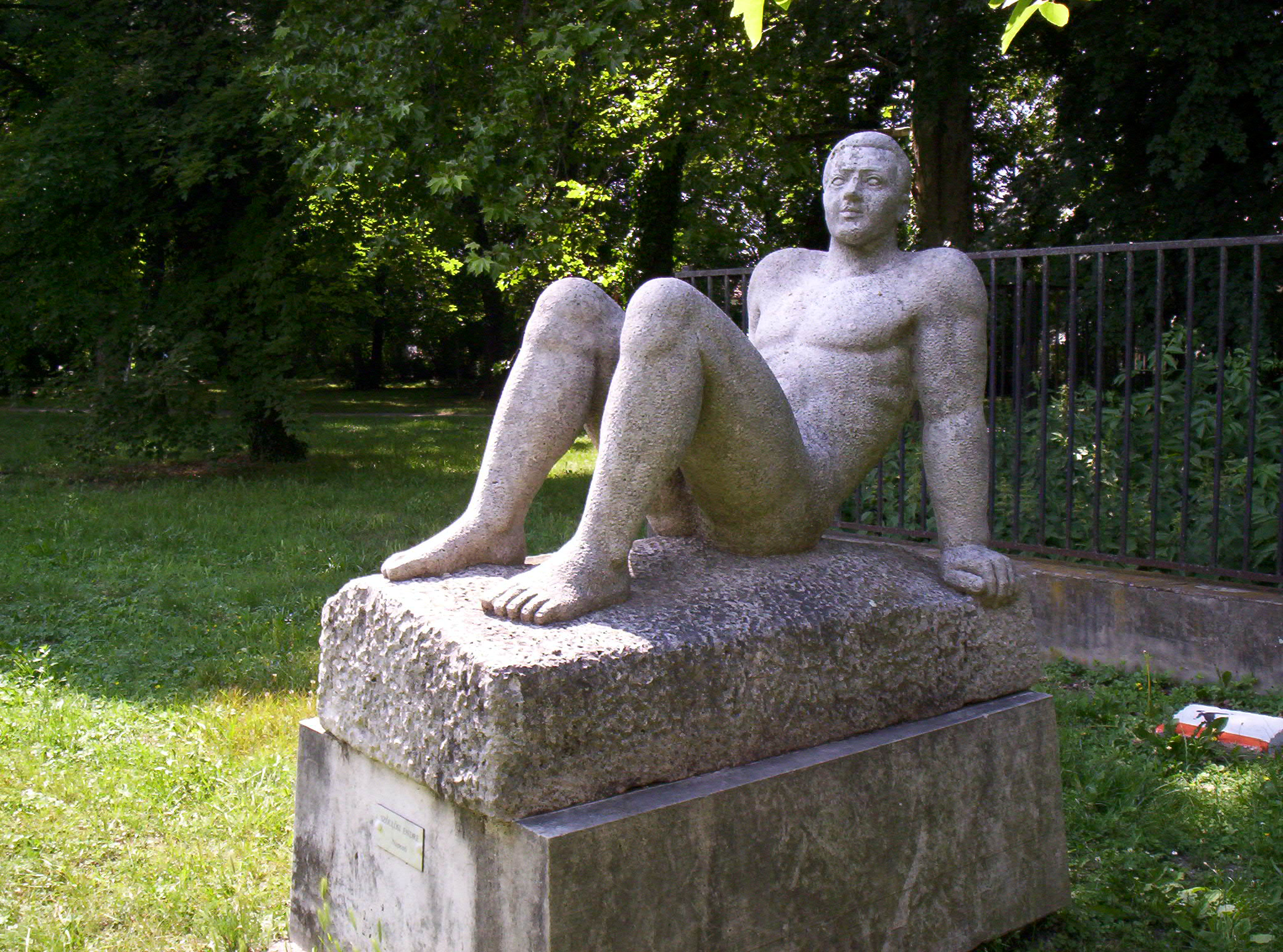 Endre Szőllősi's statue entitled Sunbather in Köztársaság Liget, Pápa, Hungary. Szőllősi Endre Napozó című szobra a pápai Köztársaság Ligetben.